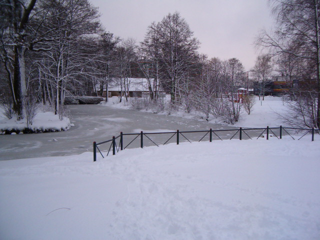 Löwenruh' park. Tallinn.